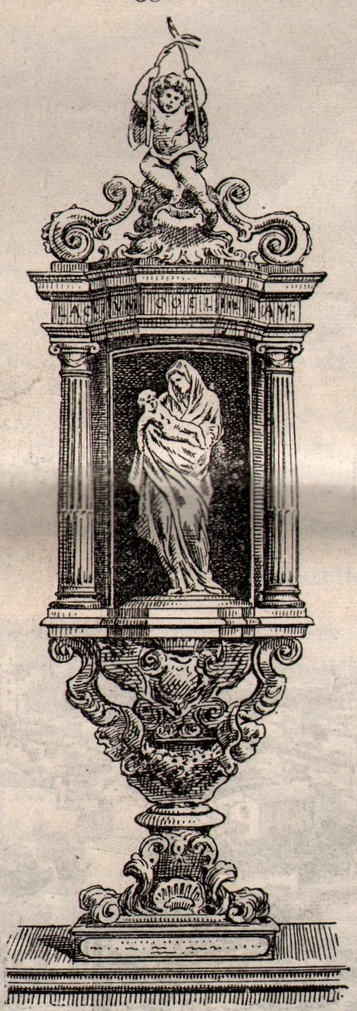 Reliquiario di Santa Maria del latte dello scultore Soldani